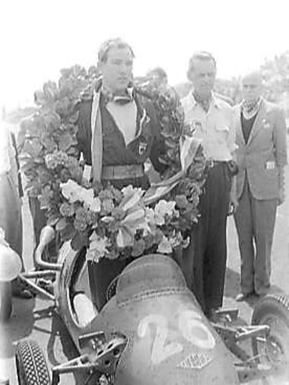 Stirling Moss après sa victoire dans sa catégorie (500cc) lors du Grand Prix des Pays-Bas 1951 sur Kieft.